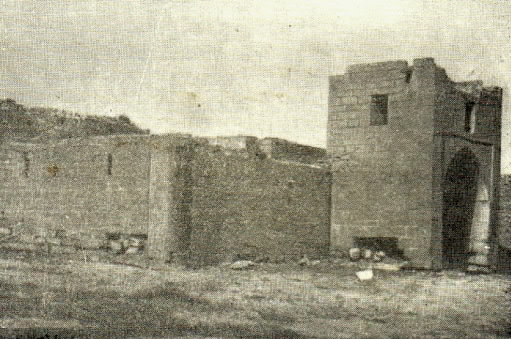 Qaraçı karvansarası